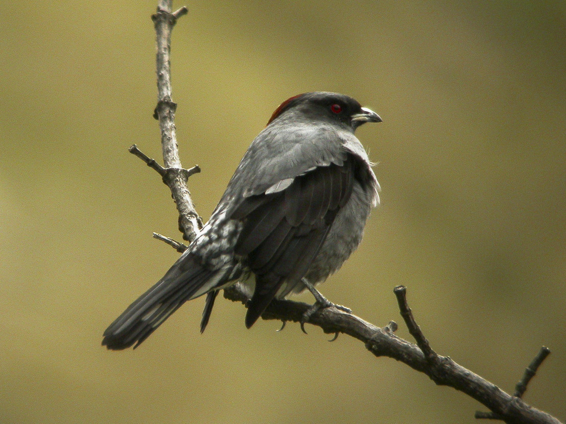 Red-crested Cotinga - EcuadorDSCN2925